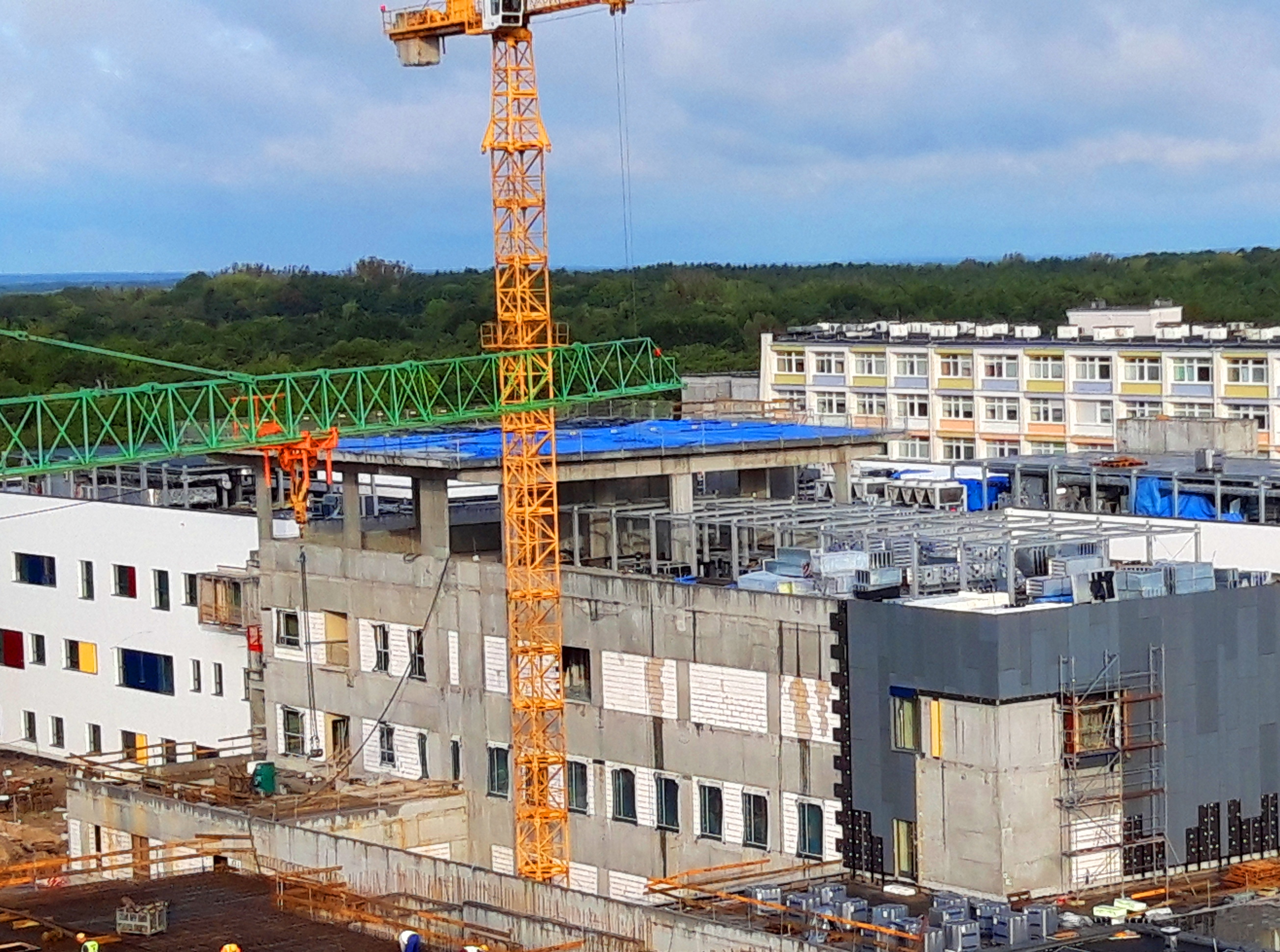 Lądowisko Toruń-Bielany w budowie